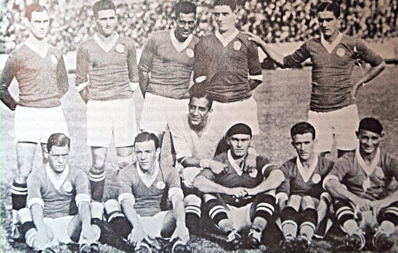 Palestra Itália (Antiga denominação da Sociedade Esportiva Palmeiras) Campeão Paulista de 1933